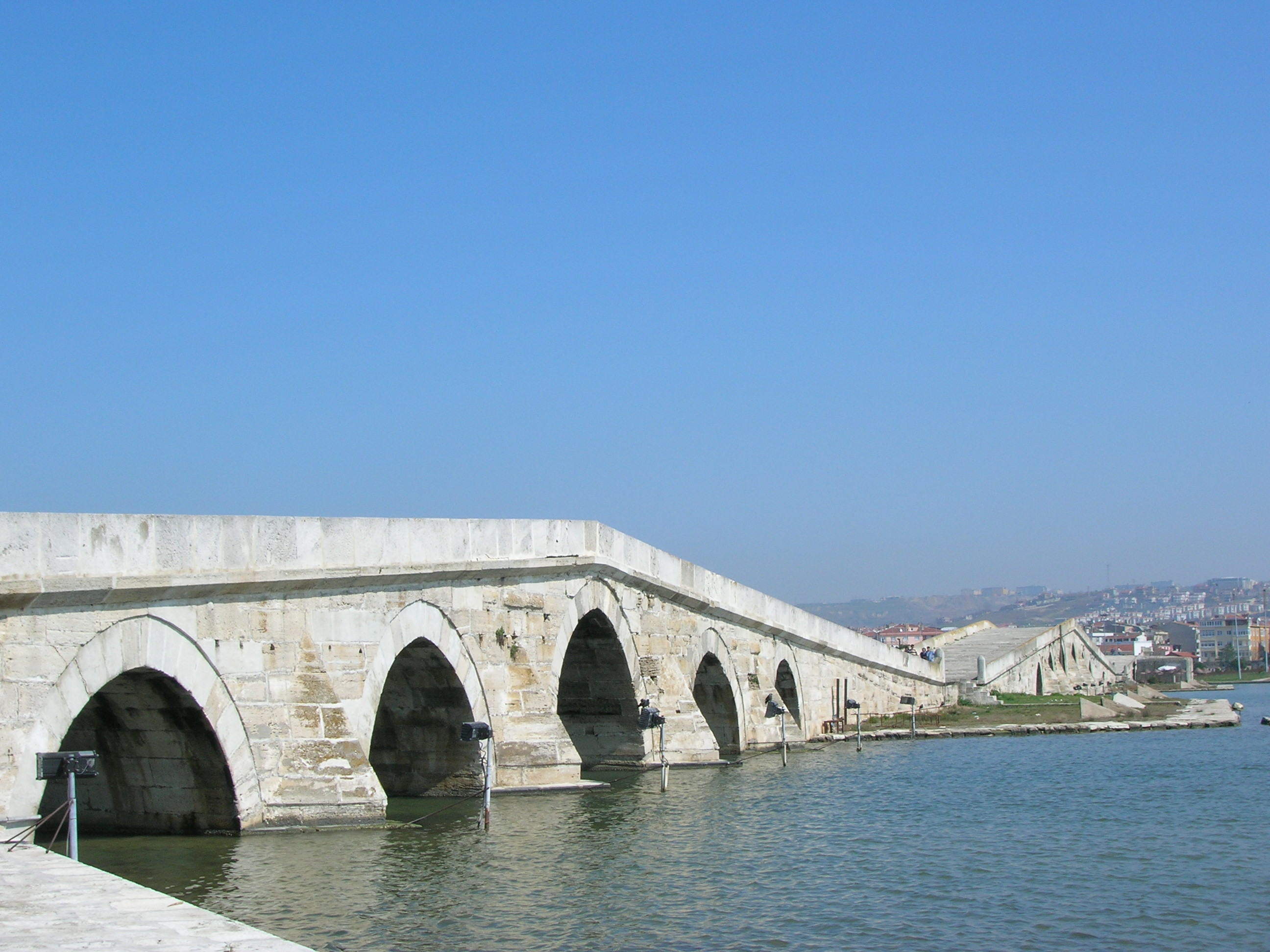 Puente imperial Otomano construido por Mimar Sinan, Arquitecto imperial Otomano, este conjunto de puentes formaba parte del camino de Estambul hacia occidente.